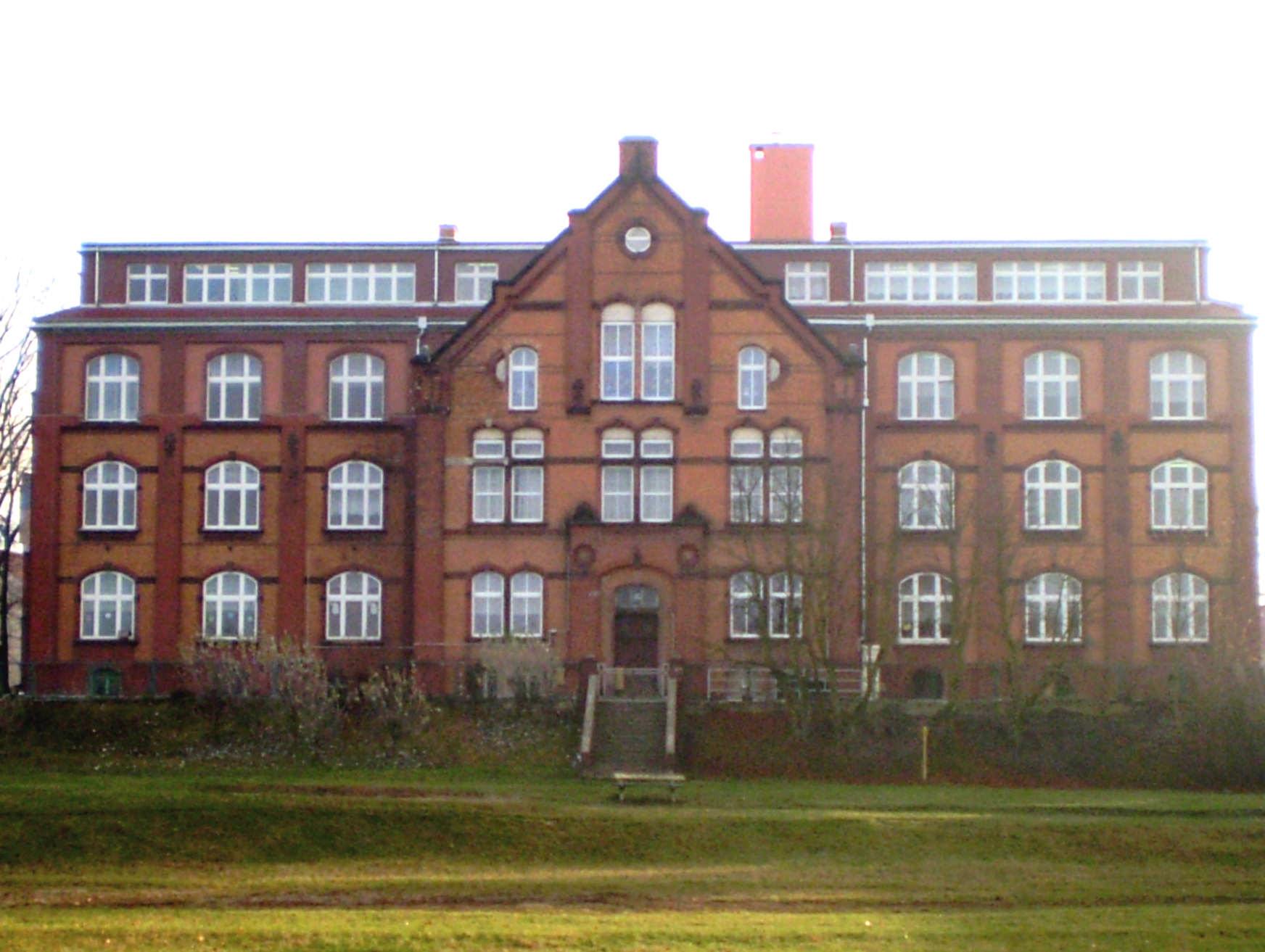 Gubin, ul. Racławicka 2 – Szkoła Podstawowa nr 1.